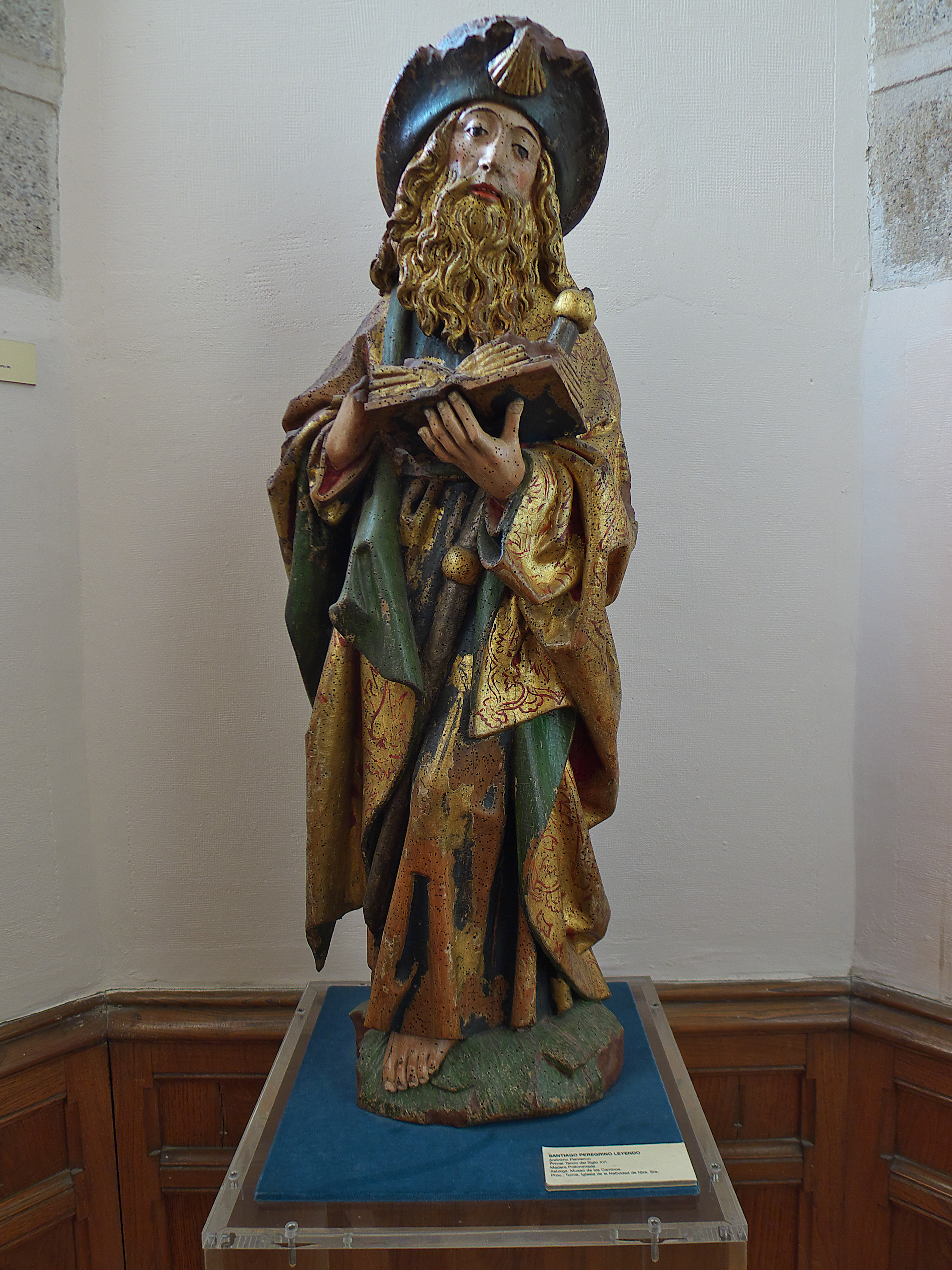 Procedente de la Iglesia de Nuestra Señora de la Natividad (Turcia). Talla flamenca de principios del XVI, madera policromada.